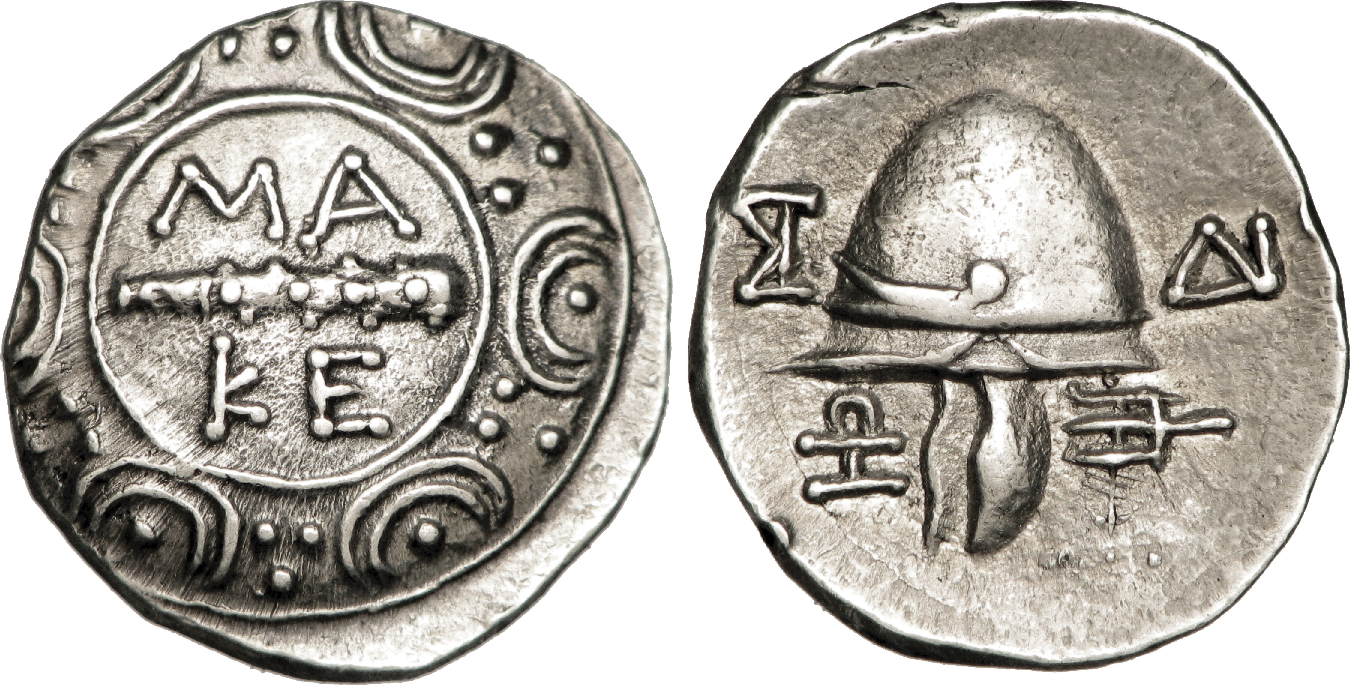 Nom de l'atelier : Macédoine, Amphipolis Métal : argent Diamètre : 15mm Axe des coins : 5h. Poids : 2,59g. Titulature avers : MA/KE. Description avers : Bouclier macédonien sur lequel est placé horizontalement la massue d’Héraklès tournée à droite et accostée de chaque côté de la légende. Traduction avers : (de Macédoine). Description revers : Casque macédonien vu à gauche ; derrière une tête de trident tournée à gauche. Légende revers : (SI) - (DI)/ (IW)